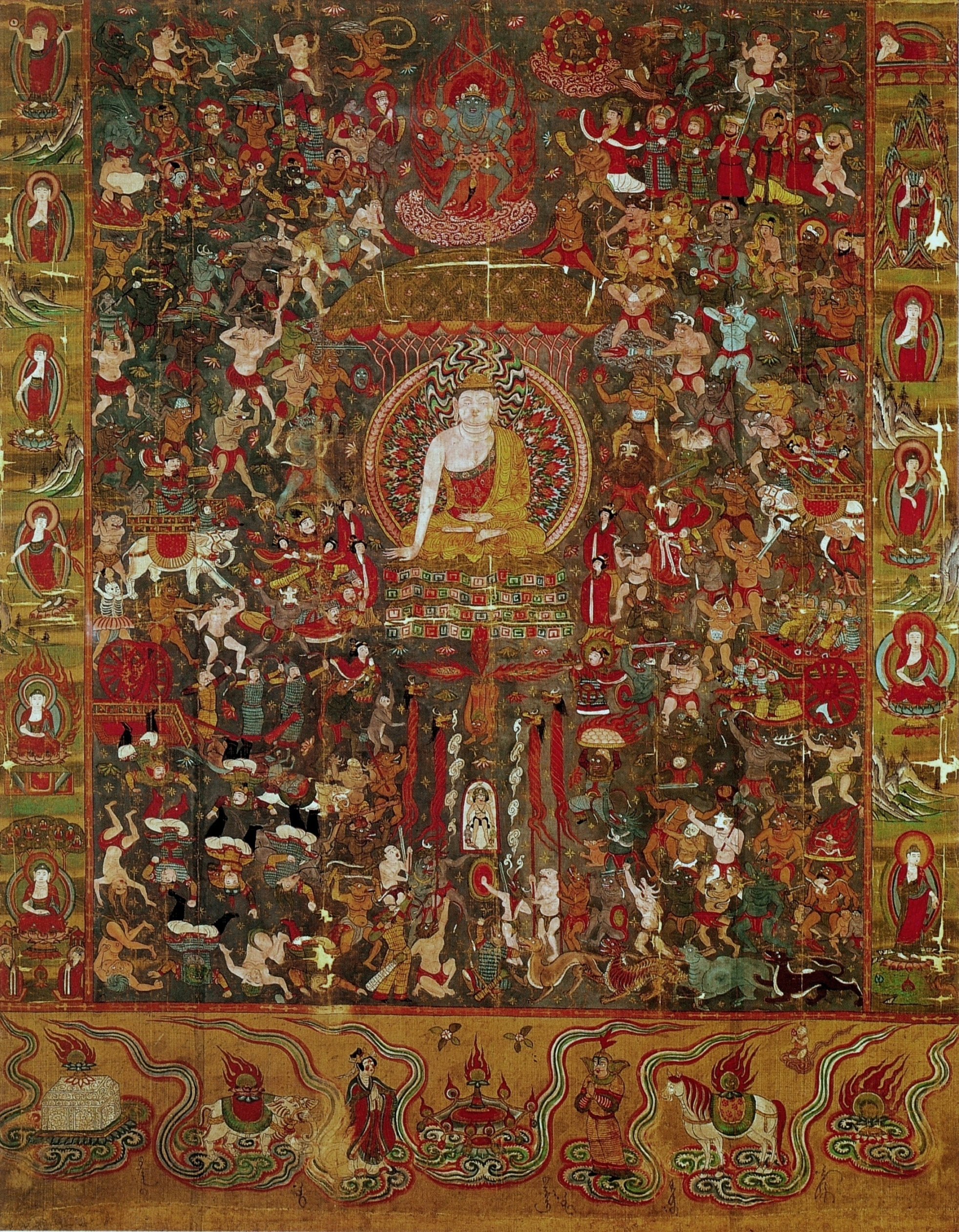 Мара испытывает Будду. 10 в. Дуньхуан Муз Гимэ